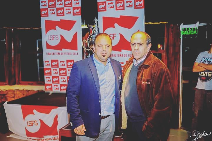 DT Sel Uru